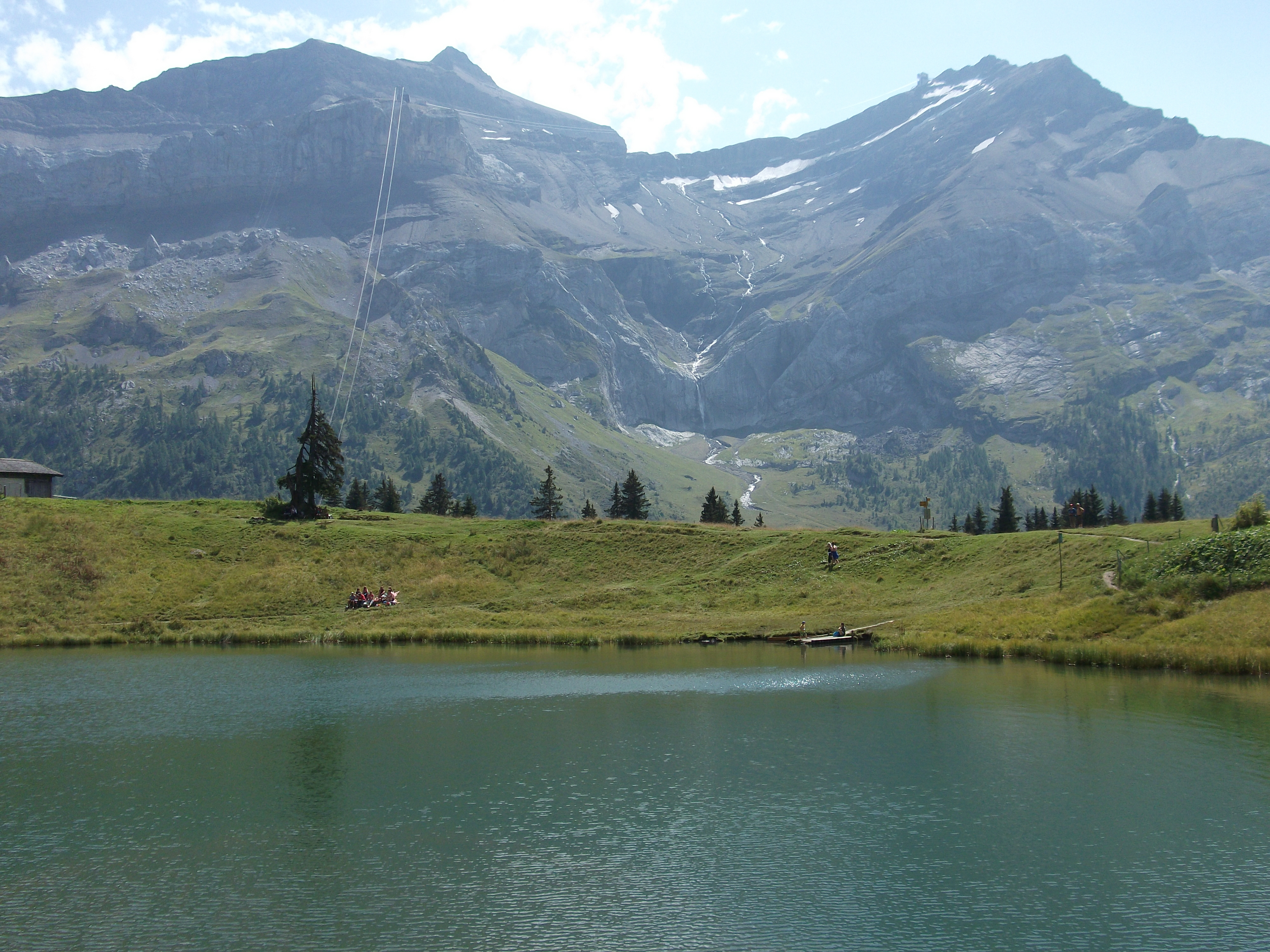 פסגת גלאסייר 3000 במבט מאגם ריטאו בפסגת איסנהאו